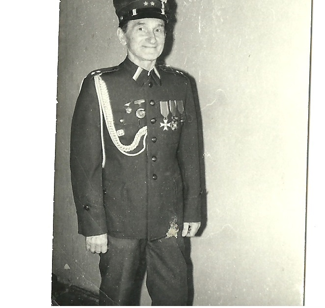 stanisław książkowski